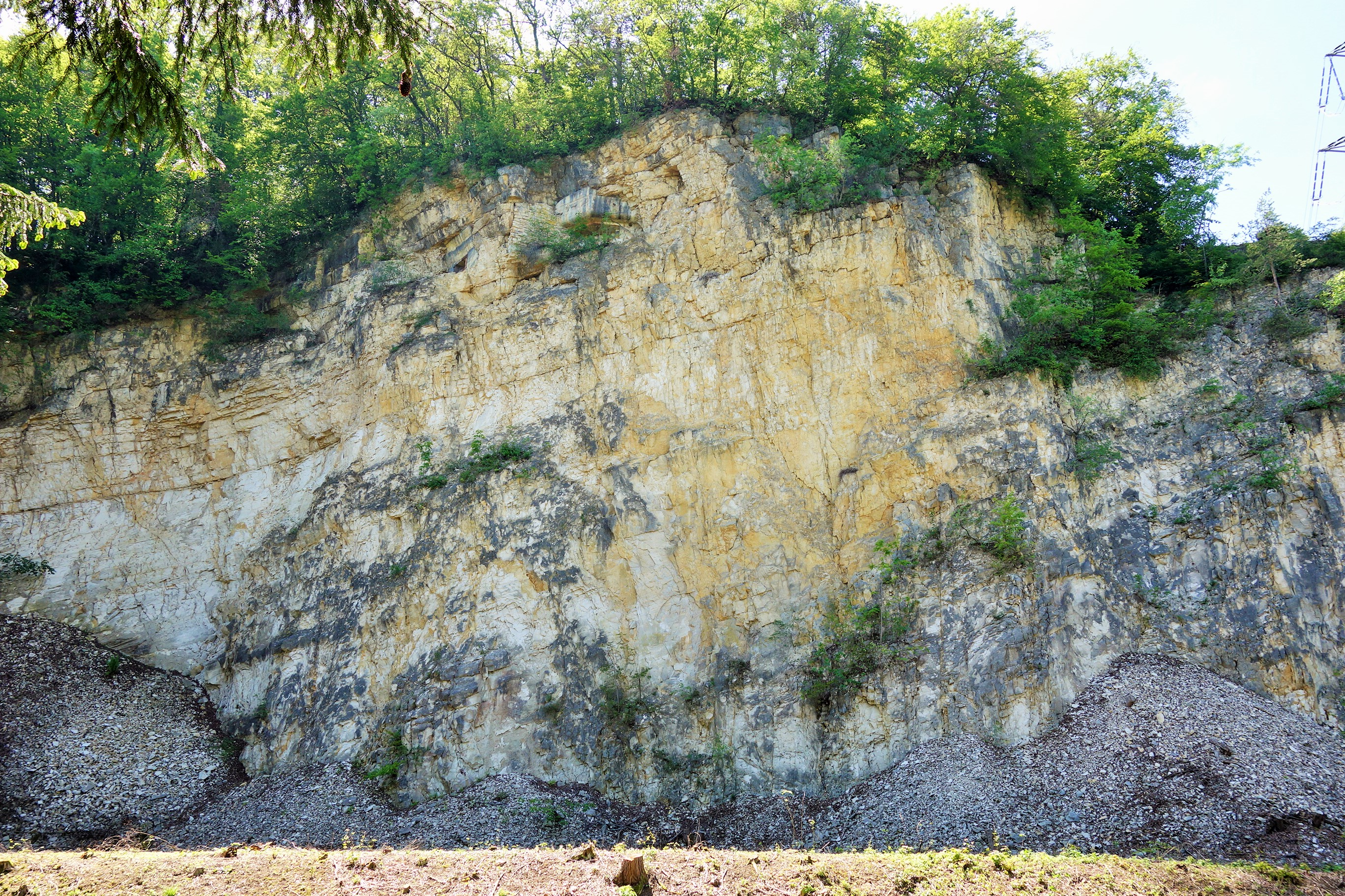 Sperrstelle Hülftenschanze, Frenkendorf BL, Schweiz